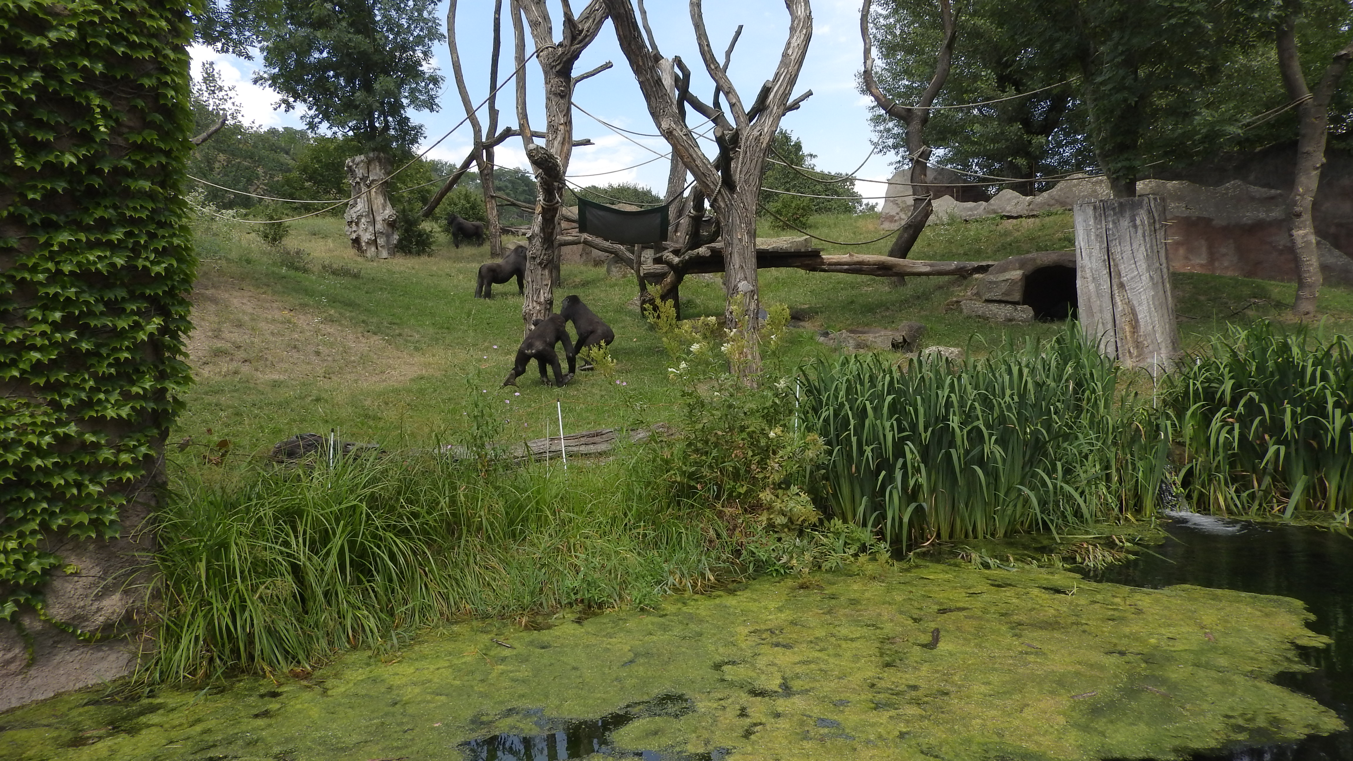 Část gorilí tlupy ve venkovním výběhu pražské zoo v létě 2018